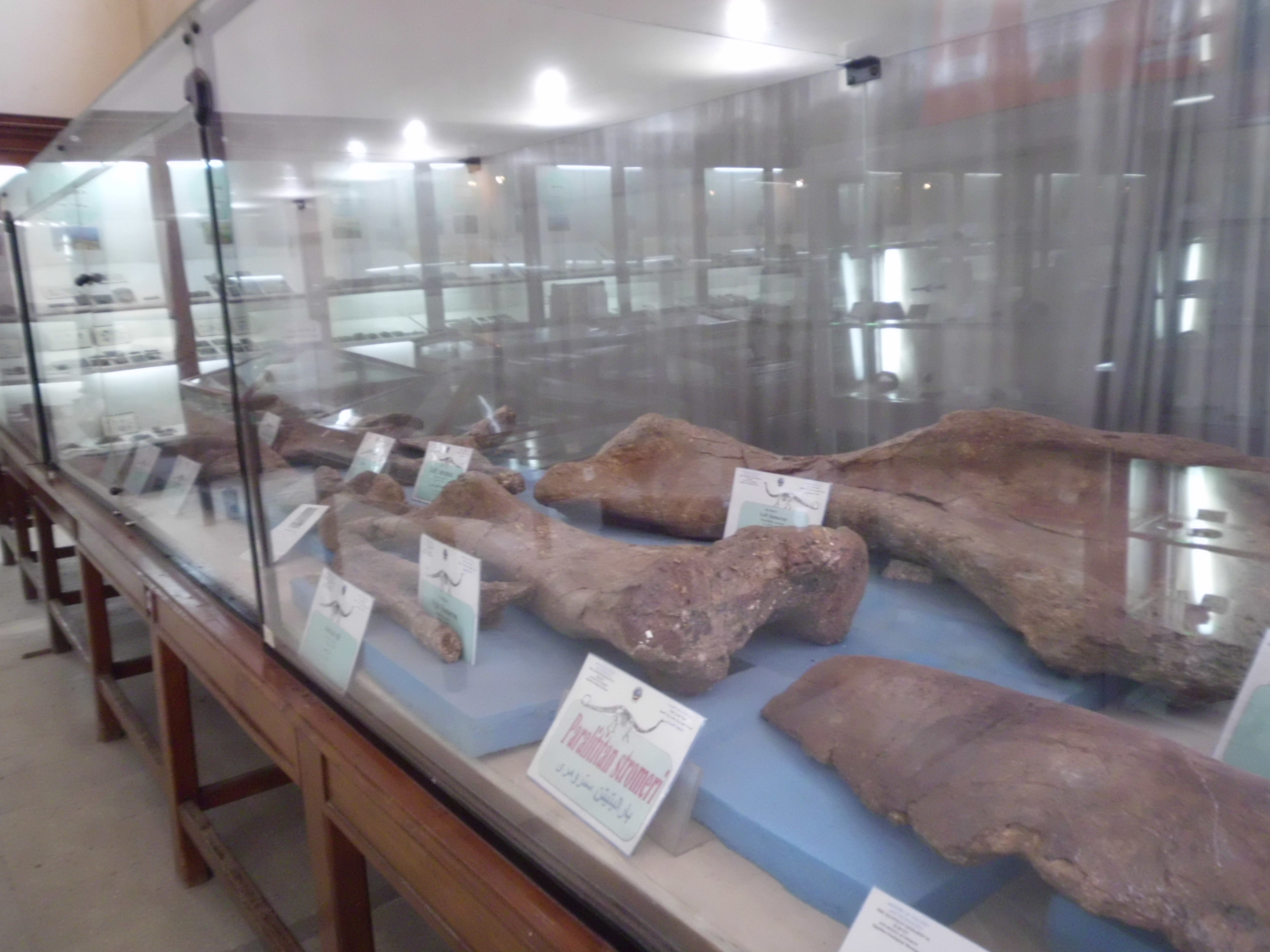 هو احد انواع الديناصورات اكلة الاعشاب في العصر الطباشيري المتاخر بمنطقة الواحات البحرية منذ ما يقرب من 95 مليون سنة وتم اكتشافه بواسطة المساحة الجيولوجية المصرية عام 2000 وكلمة الباراليتيتن كلمة لاتينة تعني (ديناصور المد والجزر) وهو ديناصور اكل للاعشاب يمتاز بحجم جمجمة صغير ورقبة طويلة واطراف امامية مساوية في الطول للاطراف الخلفية وذيل طويل وبلغ وزنه 80 طن وطوله 33,5 متر ويعد ثاني اضخم ديناصور في العالم في العصر الطباشيري وكان فريسه سهله لديناصور اسبينوسورس والكركرودونت سورس والبحرية سورس